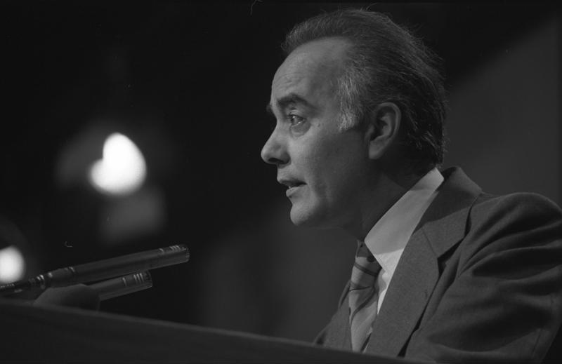 FDP-Bundesparteitag 1975 in der Rheingoldhalle, Mainz